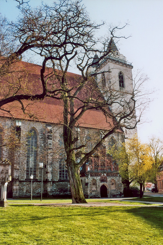 St.-Johannis-Kirche in Schönebeck – Giebel-Seite (aktuelles Foto /April 2009)